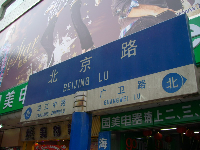 位于北京路步行街的路牌